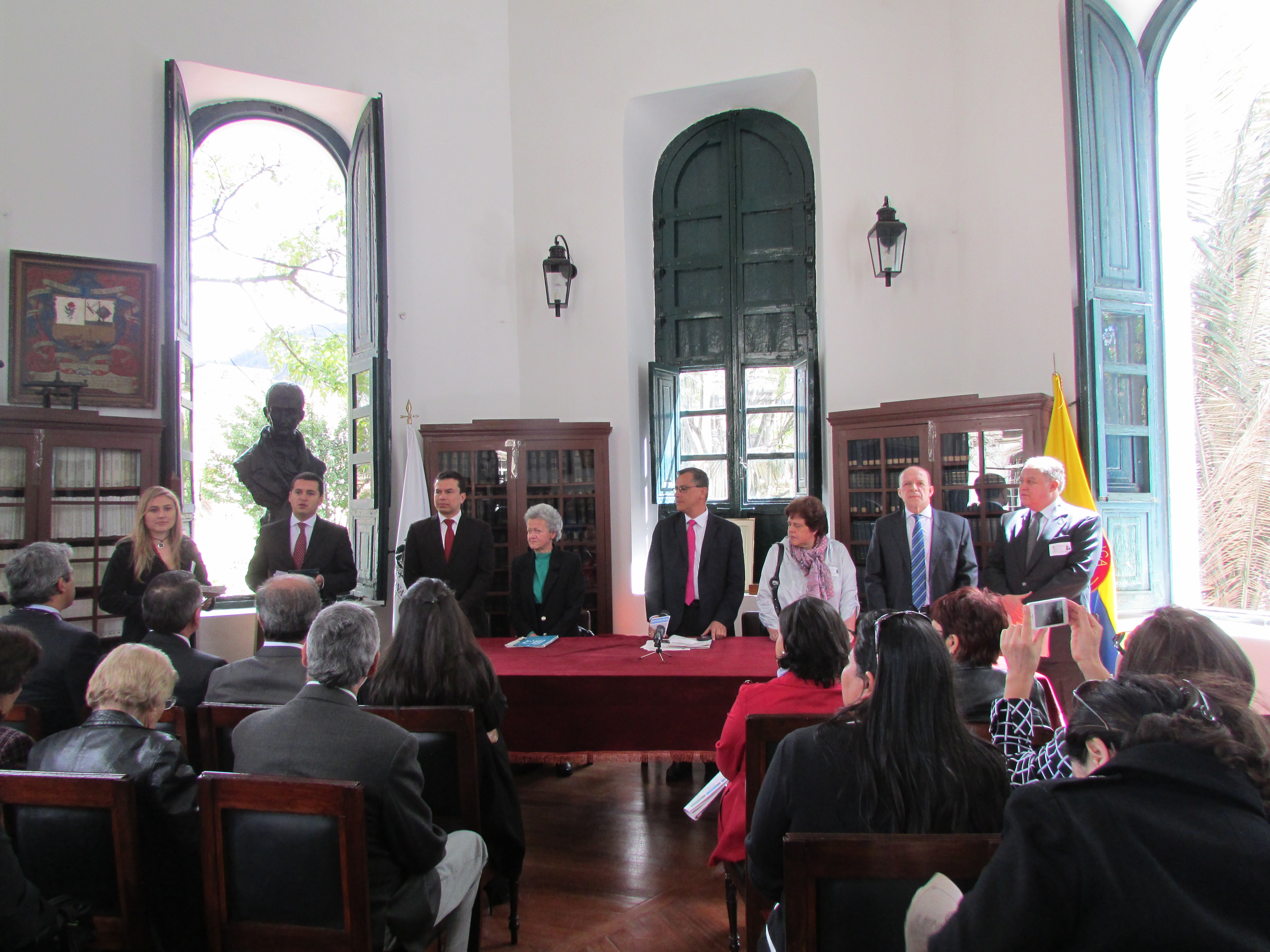 Recepción de donación y exposición en el observatorio Astronómico Nacional de la Universidad Nacional 2013.